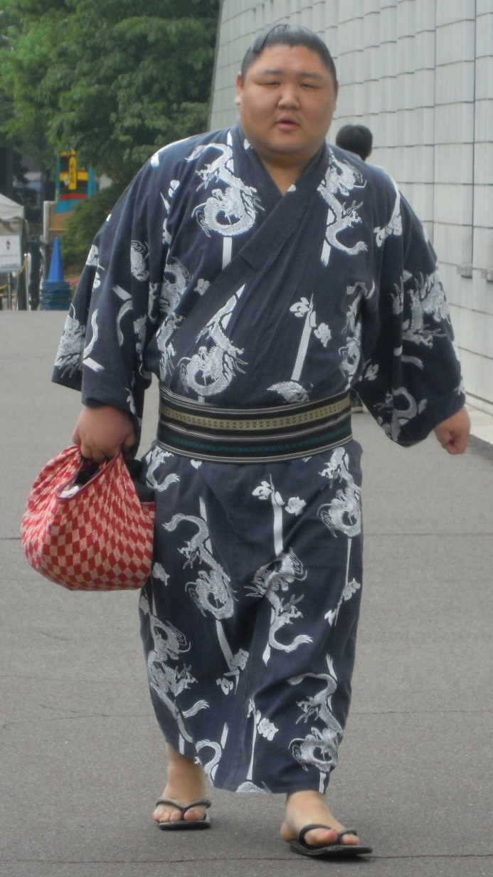 平成26年五月場所3日目、国技館入りする栃飛龍